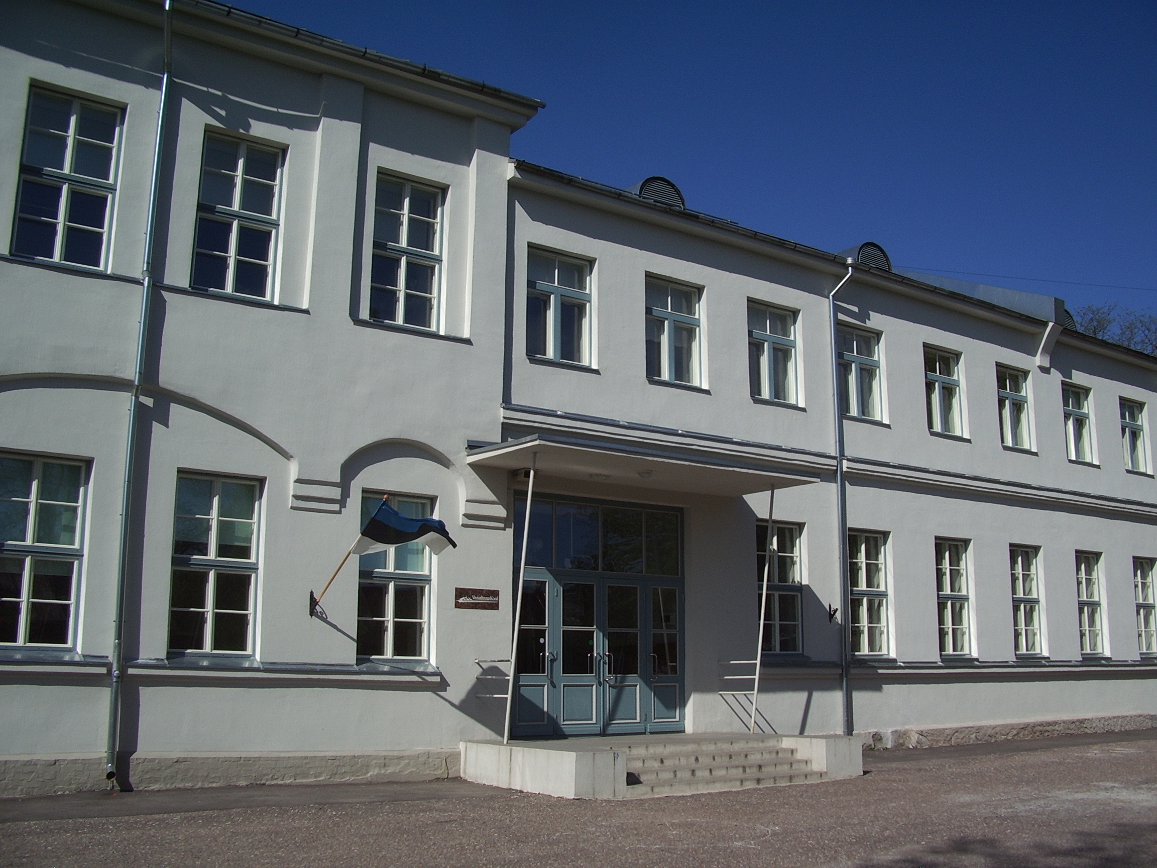 Kuressaare Vanalinna Kool